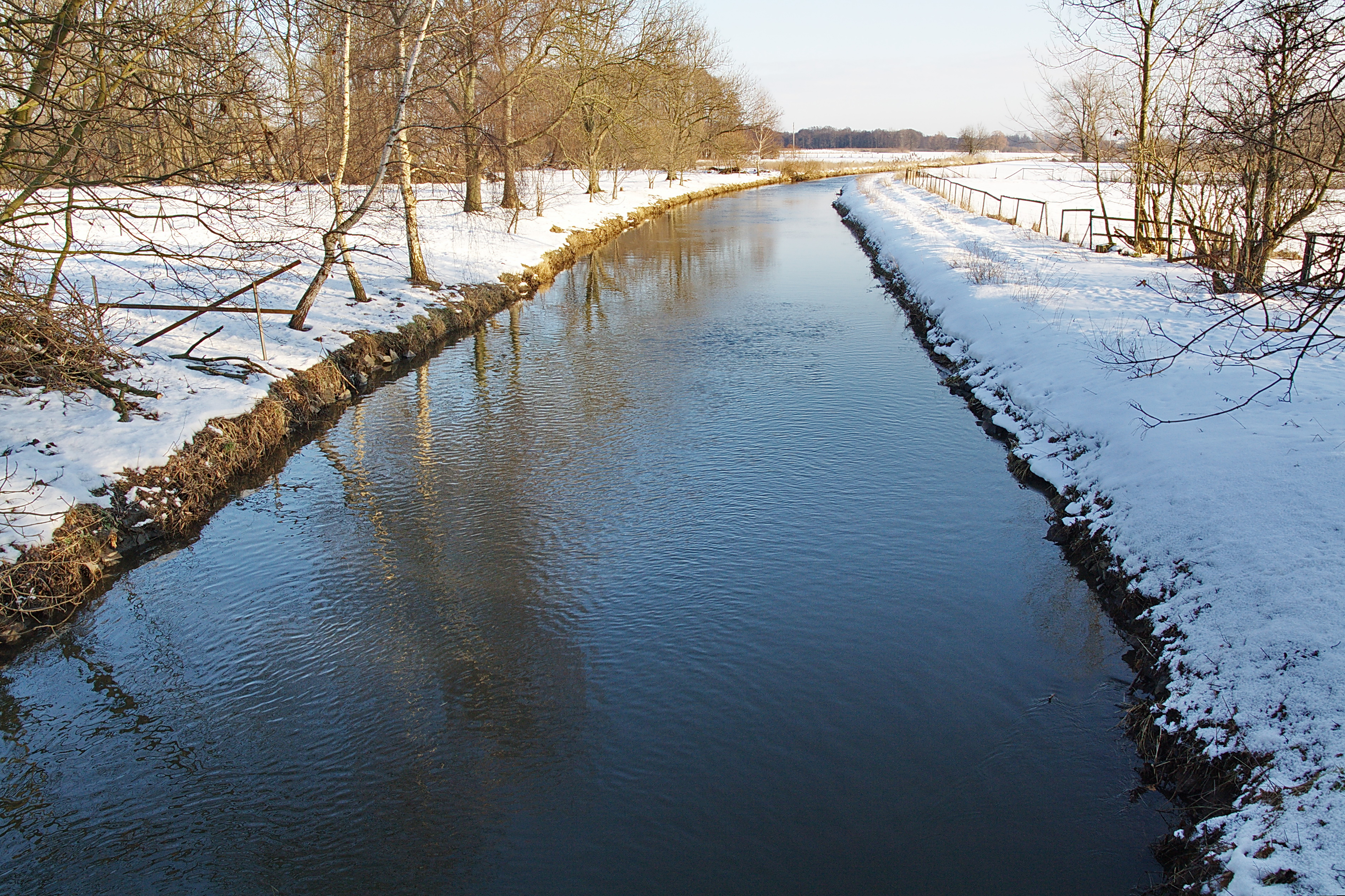 Fuhse an der Berger Wassermühle in Eixe (Peine), Niedersachsen, Deutschland